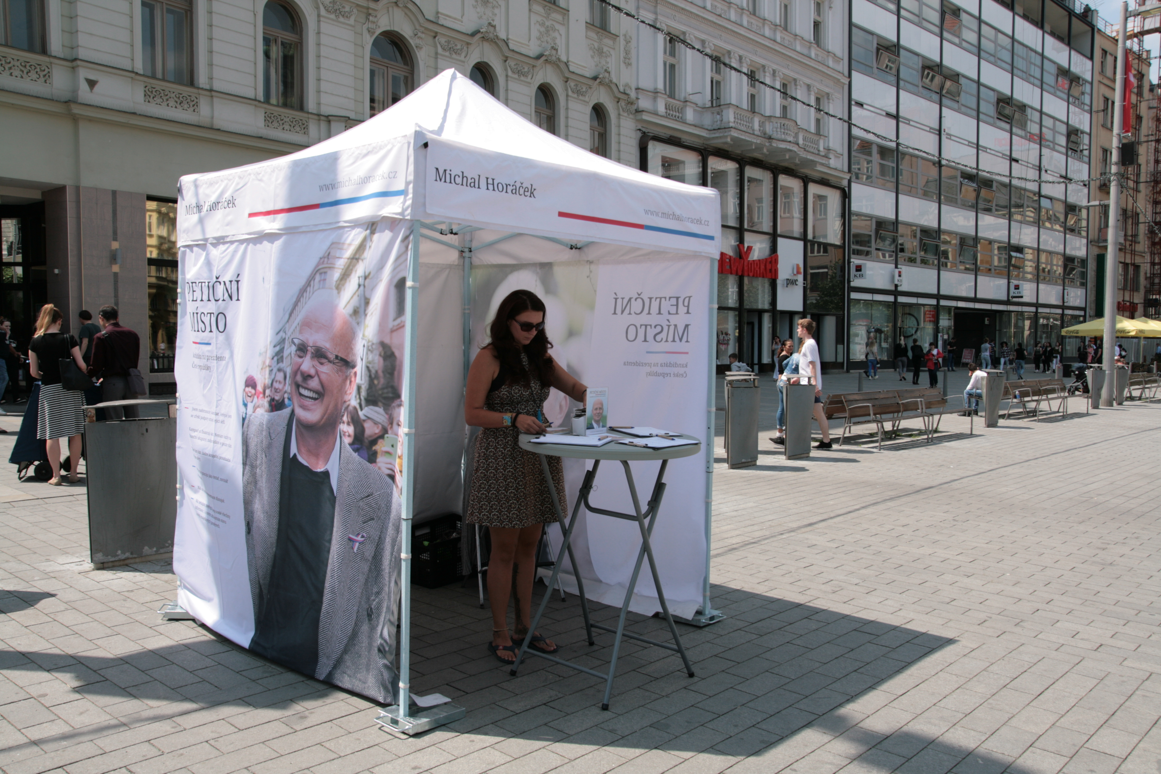 Stánek s petičními archy na podporu prezidentské kandidatury Michala Horáčka pro volby 2018. Náměstí Svobody v Brně.